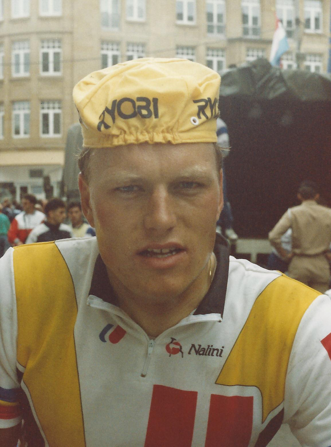 BJARN RIJS